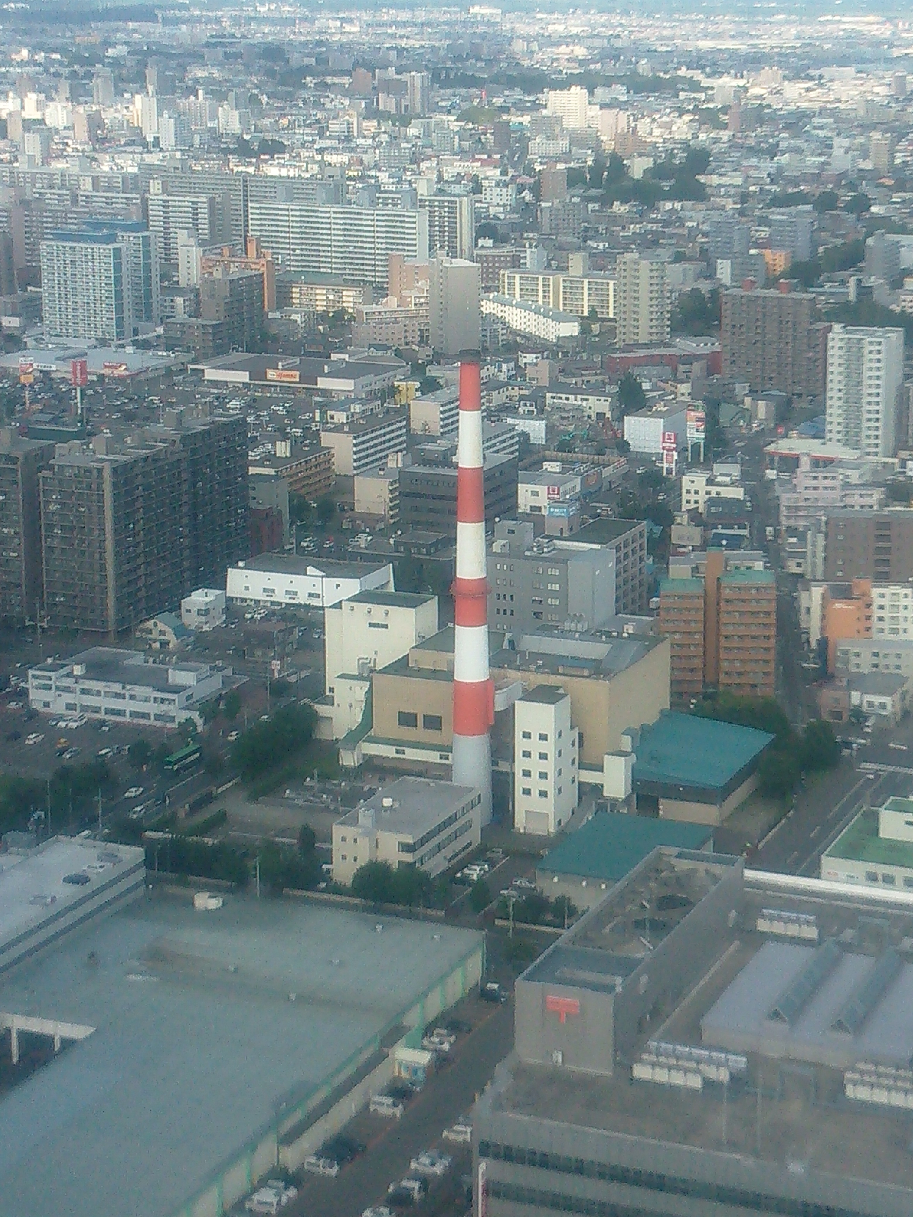 札幌市東区、北海道熱供給公社中央エネルギーセンター